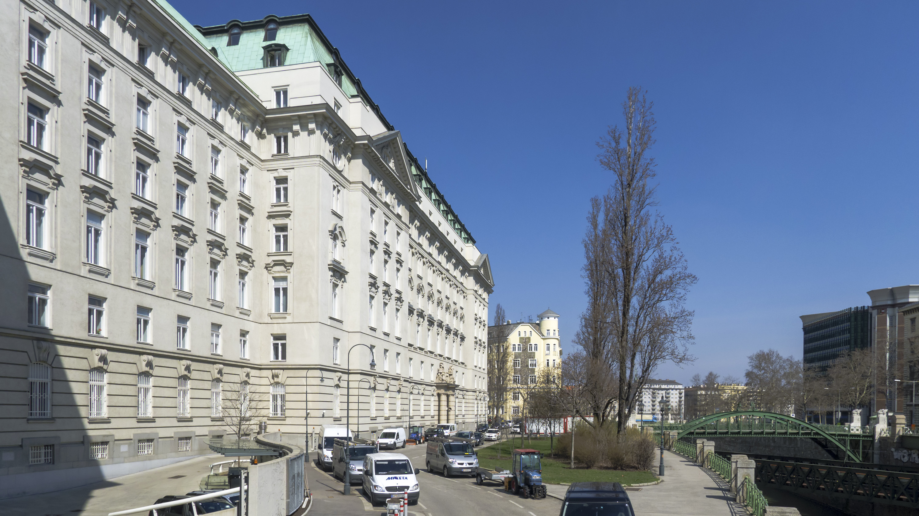 Schallautzerstraße in Wien 1 bei Nr. 6 Richtung Norden